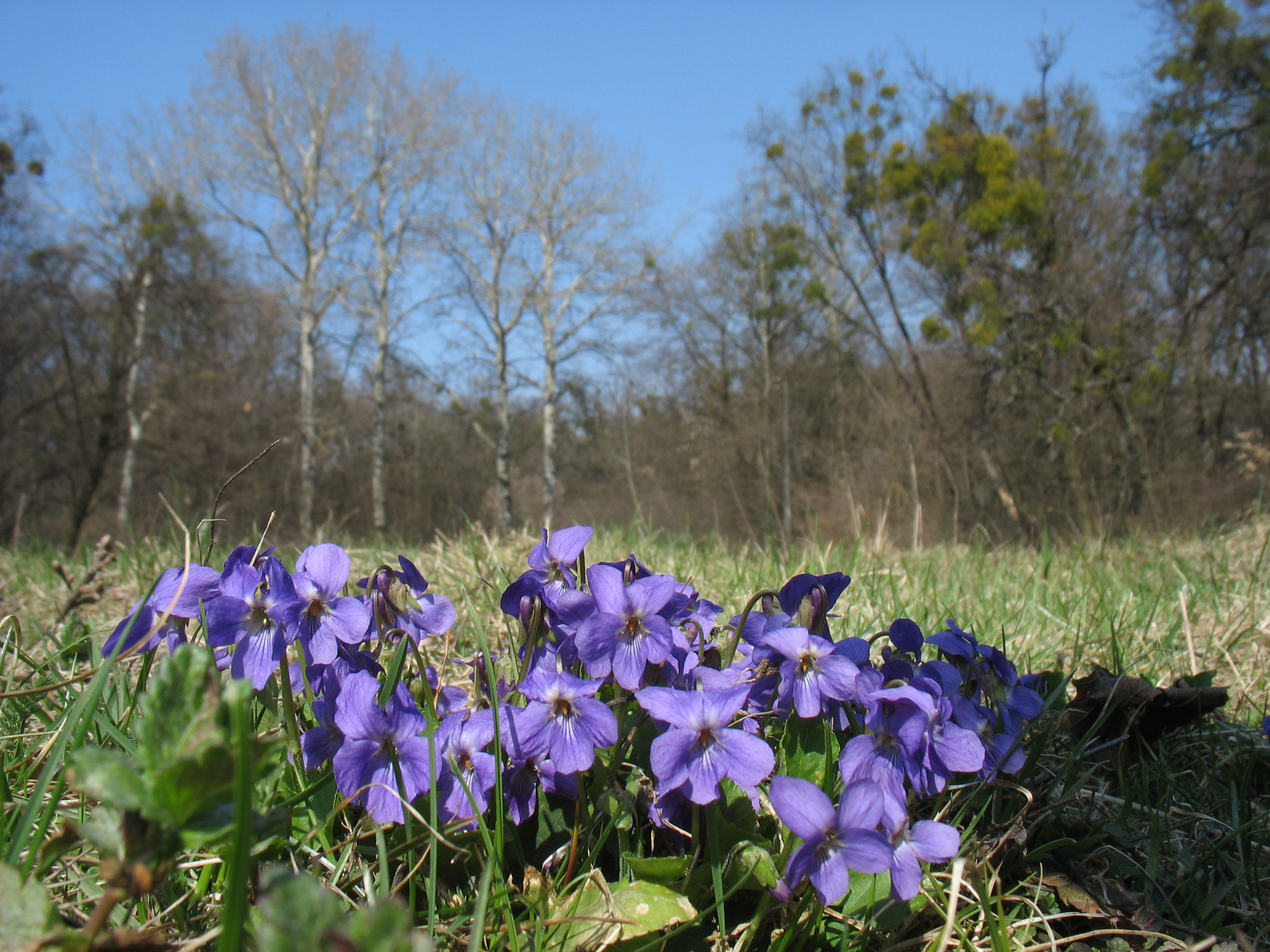 Фіалки. Парк Дар'ївка поблизу Шполи